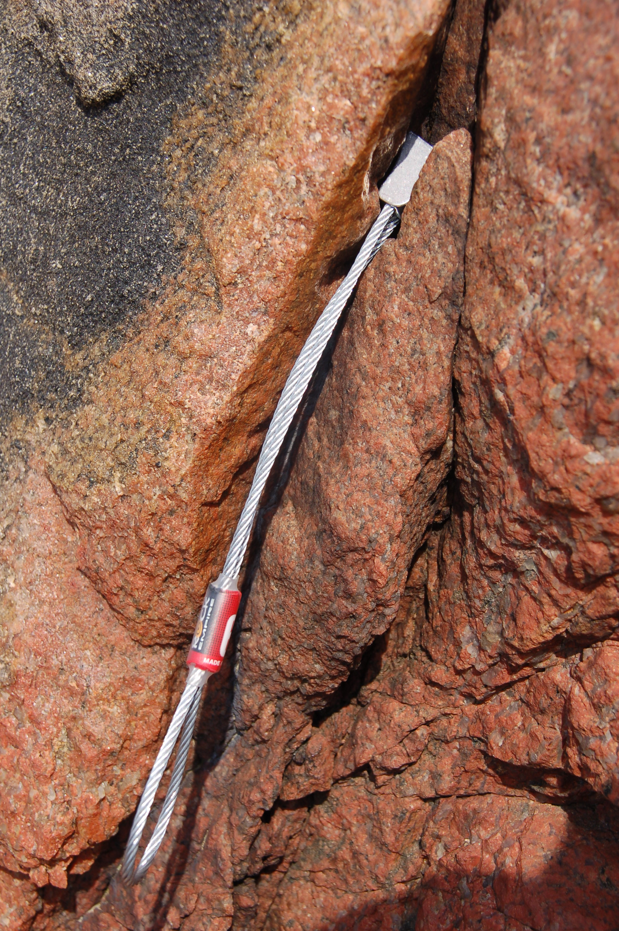 Klemmkeil im Fels (Gneis)